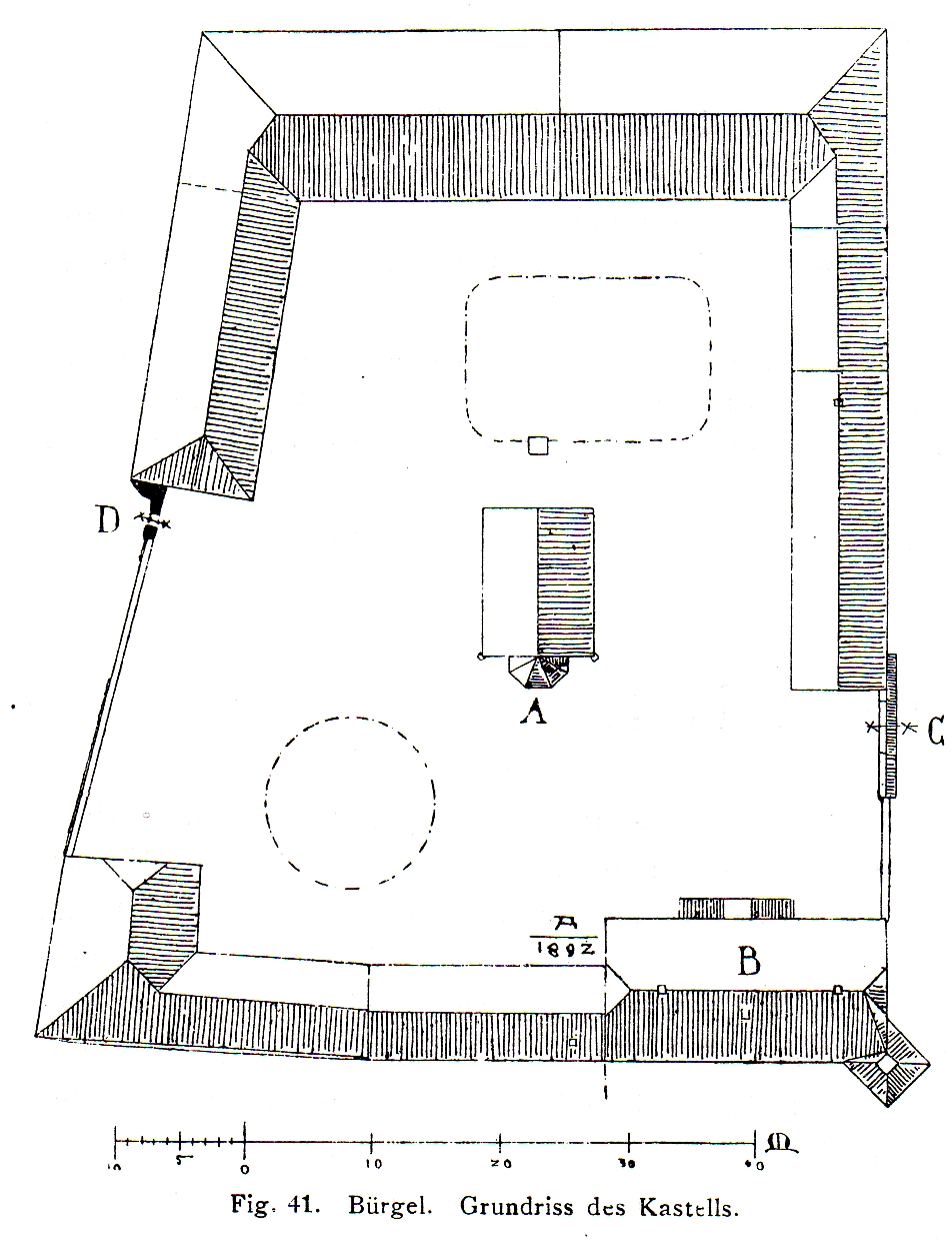 Maternuskapelle, Haus Bürgel bei Monheim/Rhein